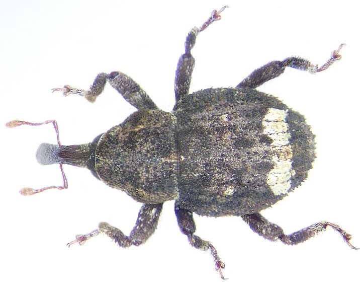 Familie: Curculionidae Grösse: 3,5-5,5 mm Verbreitung: Europa Ökologie: Entwicklung in totem Holz, Imagines an verpilztem Laubholz Fundort: Germania, Thüringen,Espenfeld/Arnstadt, Gottesholz leg. det. A.Weigel, 1995 Foto: U.Schmidt, 2006